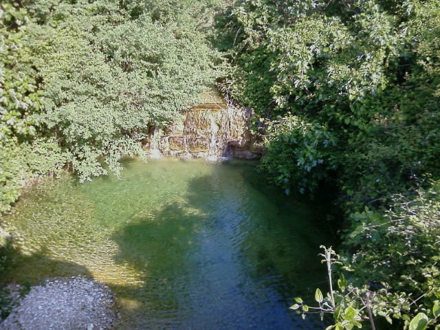 Suha Ričina ili Vela Rika, rijeka na otoku Krku, kraj Baške. Jedini stalni vodotok na hrvatskim otocima.